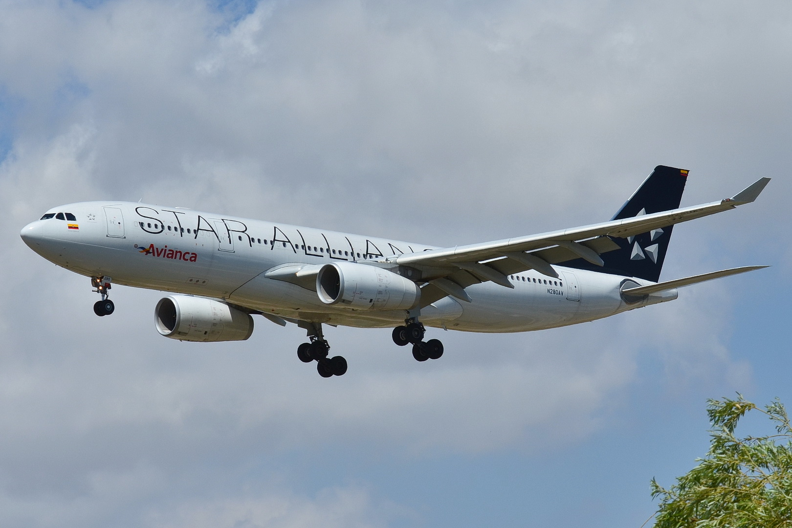 Photo prise à l'aéroport de Barcelone-El Prat (LEBL) en Espagne. Picture take at Barcelona-El Prat Airport (LEBL) in Spain.